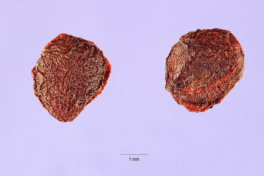 Ribes rubrum L. - cultivated currant